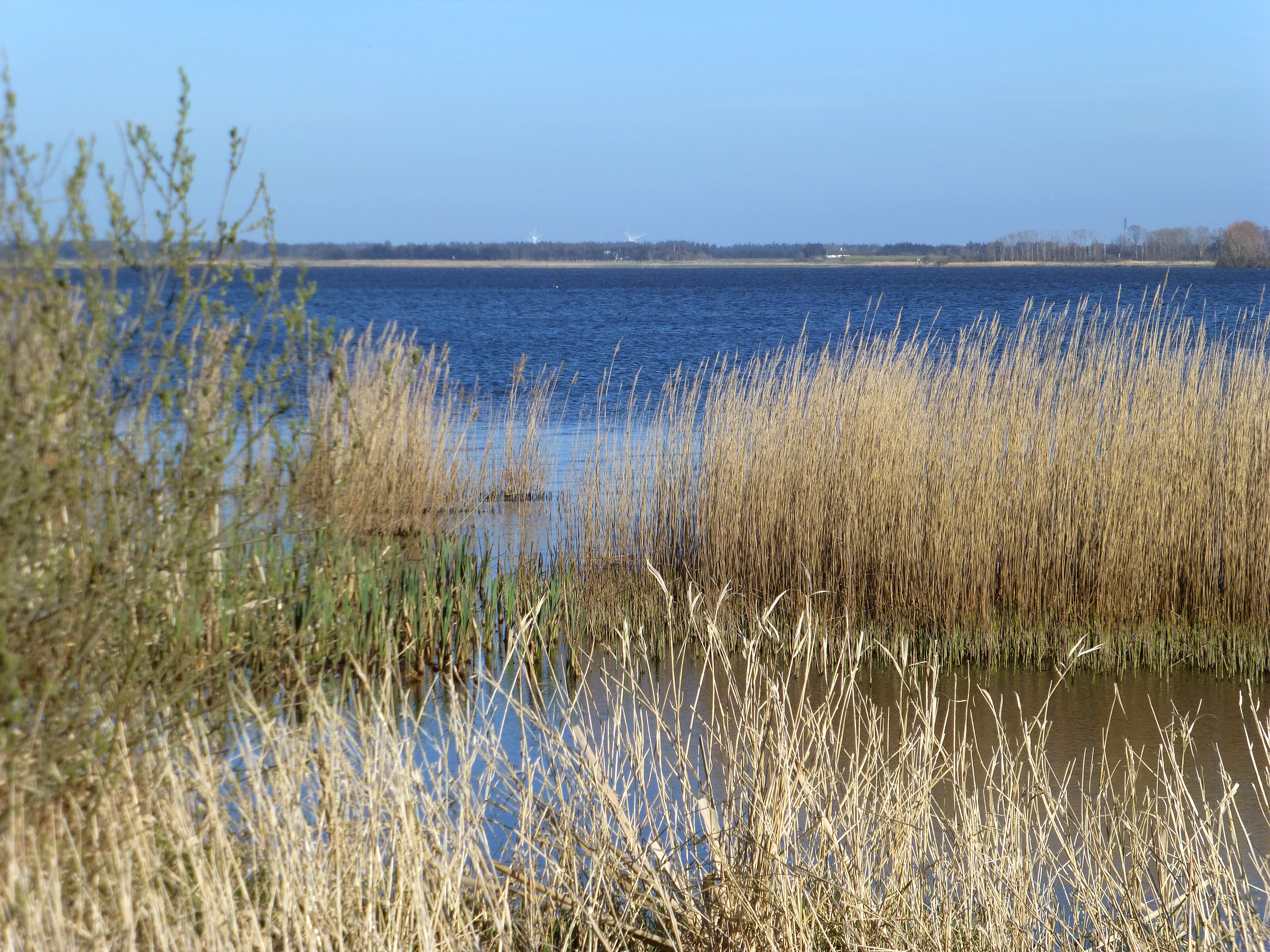 Filsø set fra vest